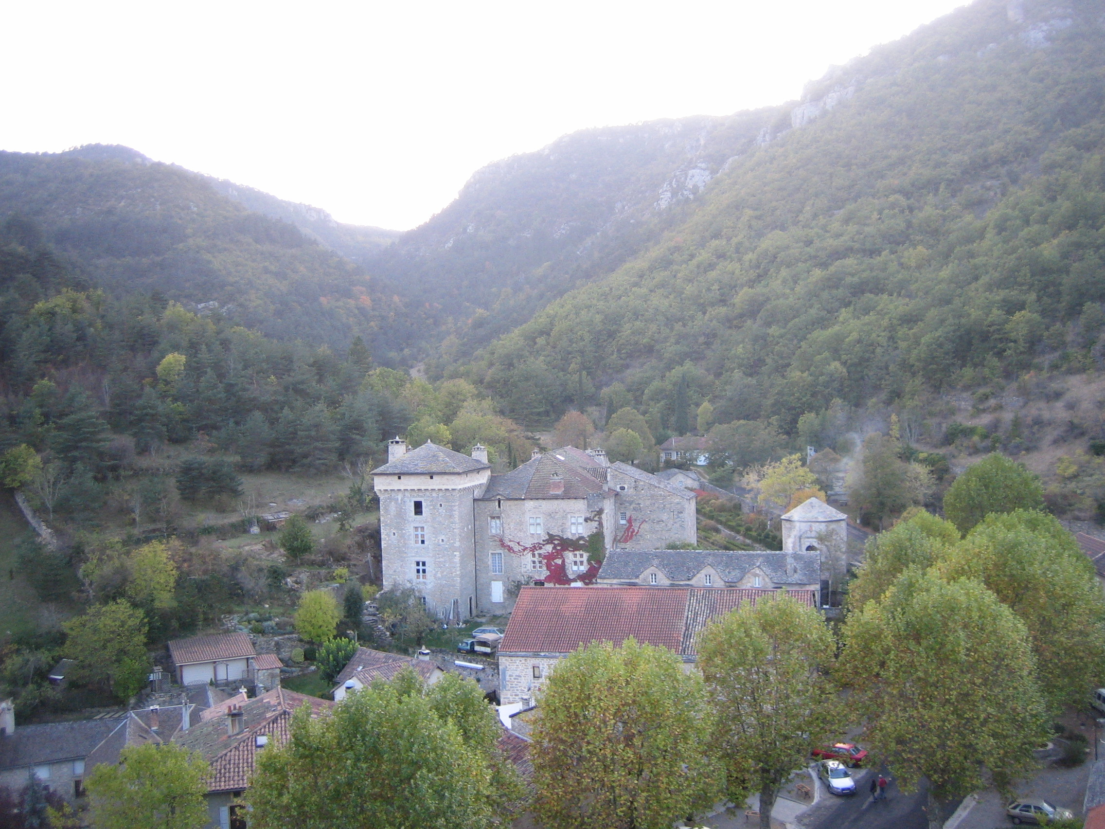 le château